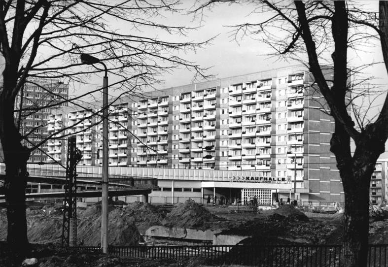 Leipzig, Grünau, Wohnblock Originalbeschreibung: ADN-ZB Gahlbeck 2.2.1982- pra-Leipzig: Bis ende des Monats Janurar sind in Leipzig-Grünau, der zweitgrößten Wohnungsbaustelle der DDR, 225 Wohnungen übergeben worden. Freiflächen und Wege werden derzeit von der Wohnkomplexen vier und fünf angeliegt. -siehe auch 1982-0202-4N-.